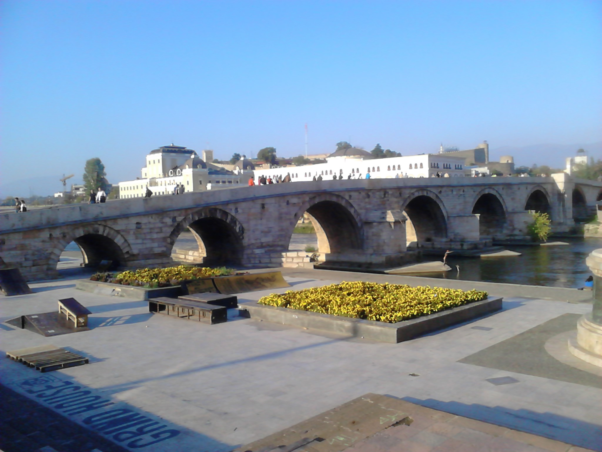 Фотографија од Камениот мост во Скопје преку ден, во центарот на градот.